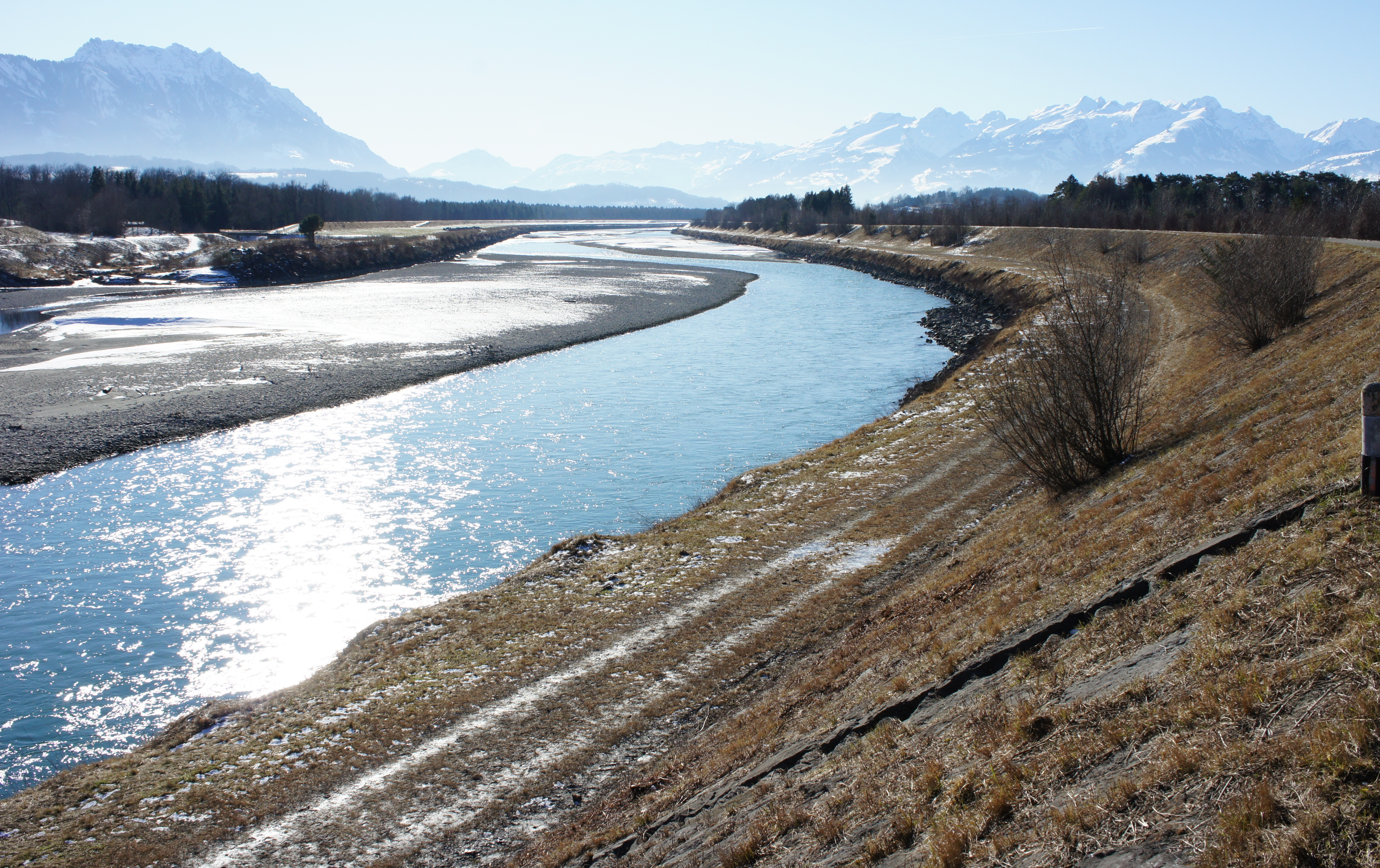 Blick aus Norden auf den Rhein bei Rüthi (rechts). Der Fluss mäandriert innerhalb der Hochwasserdämme und bildet abwechslungsweise Sandbänke. Im Hintergrund die Drei Schwestern (links) und der Alvier (rechts).